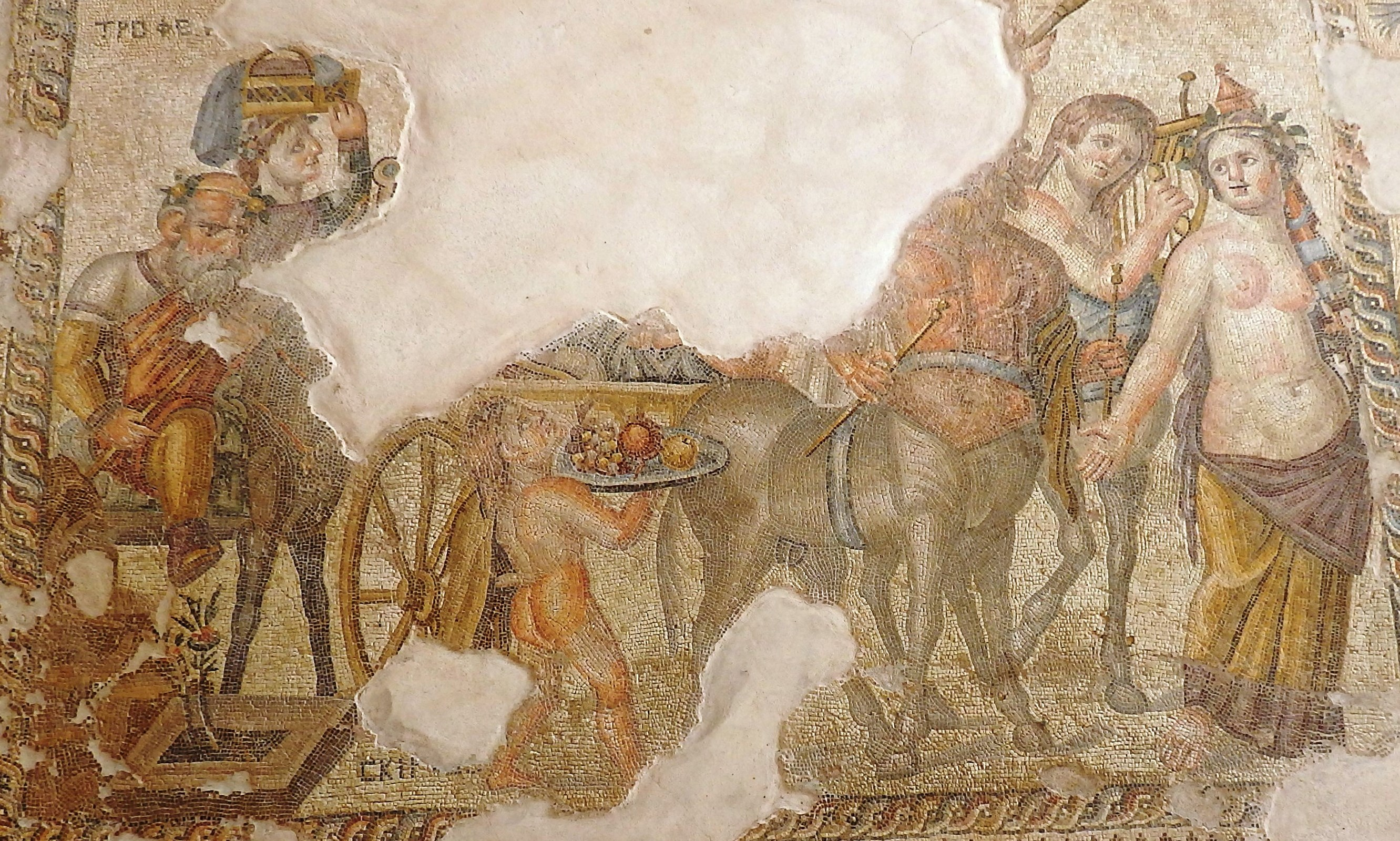 Mosaikdetail mit Dionysoszug, Haus des Dionysos, Paphos